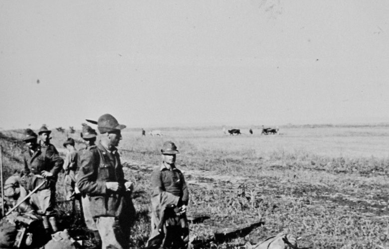 Settembre 1942. Alpini in marcia lungo la steppa.